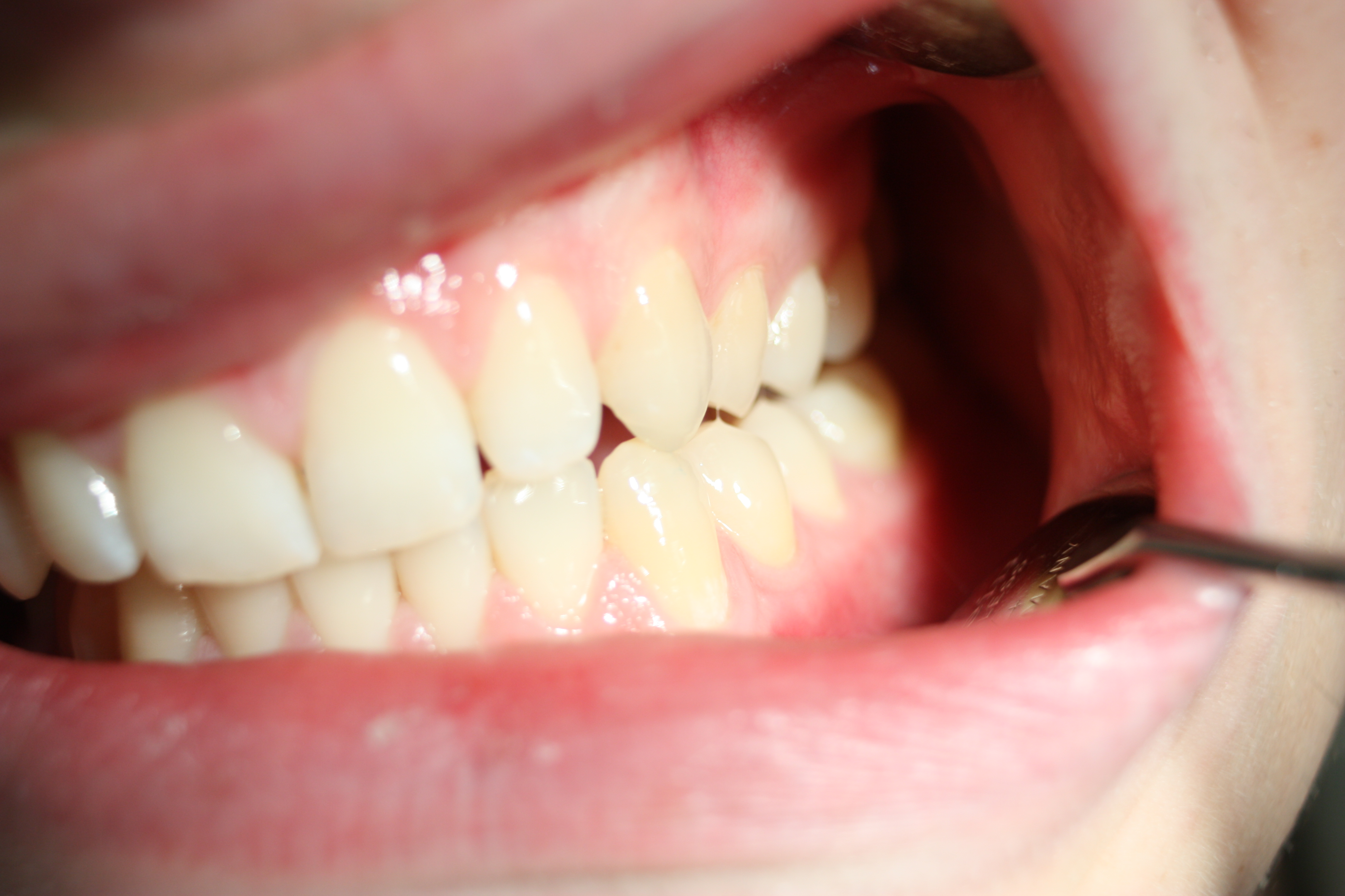 Eckzahnführung (Bildserie A und B)